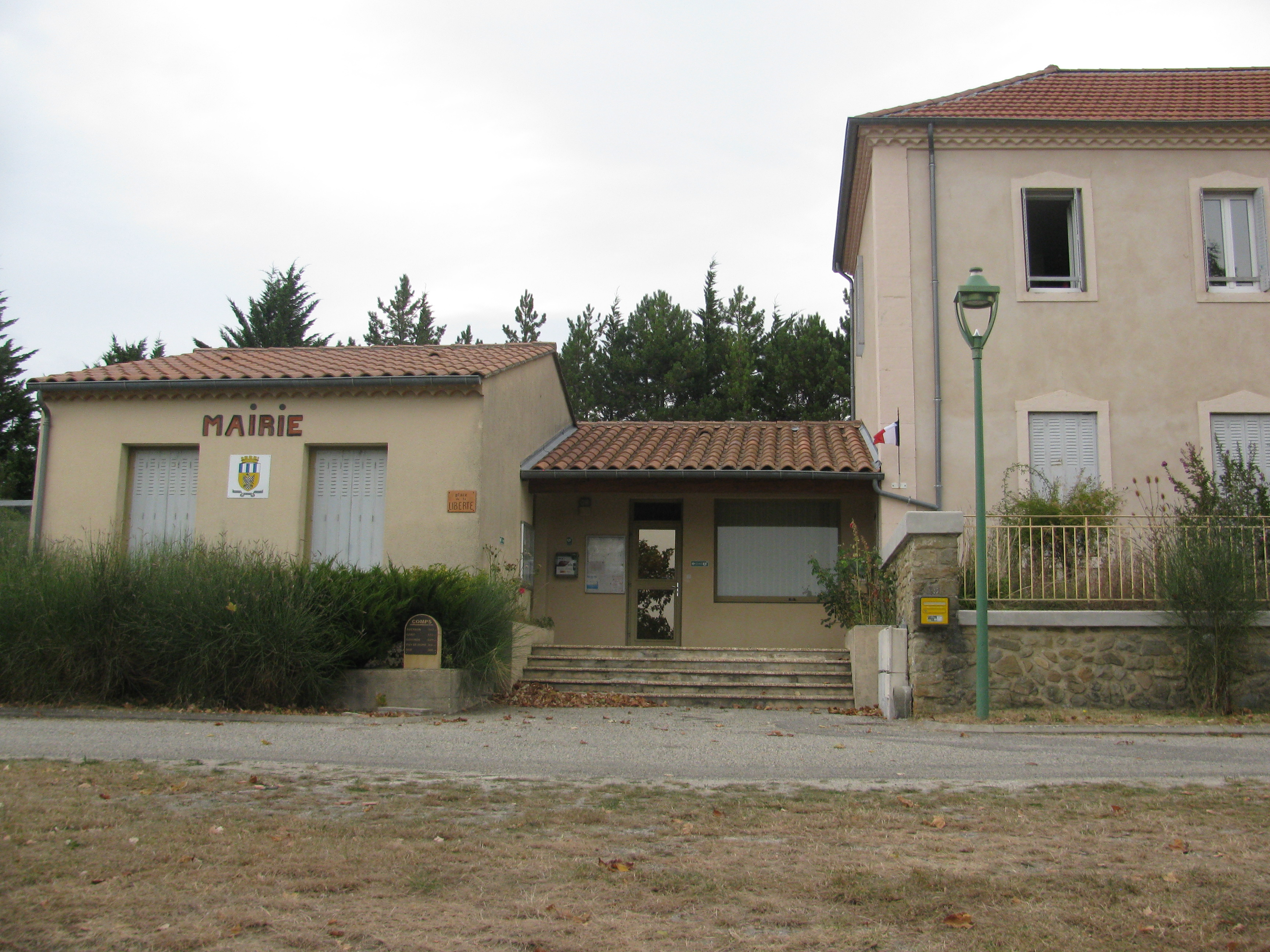 Mairie de Comps, dans la Drôme